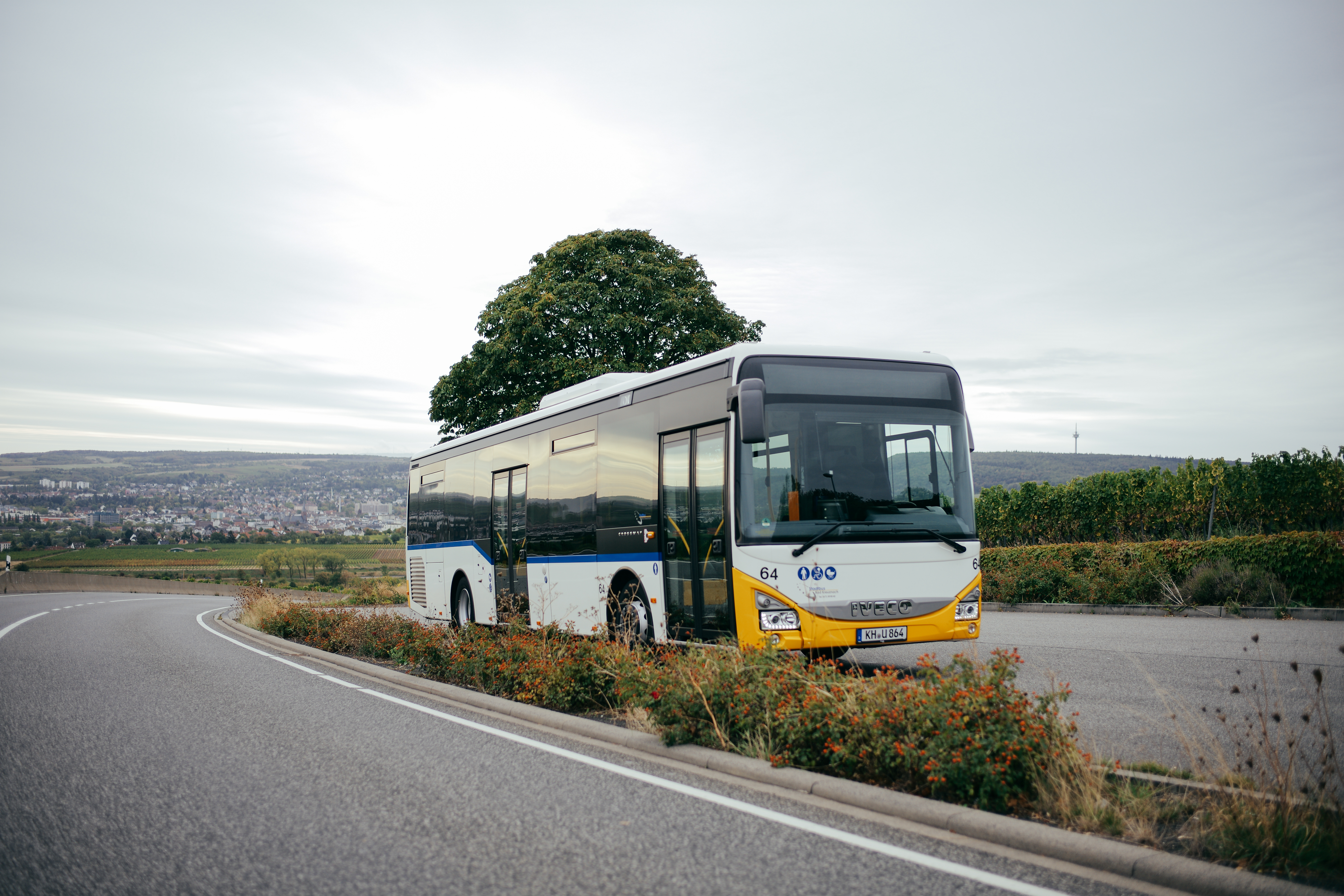 Wagen 64 (IVECO LE) im Jahr 2018